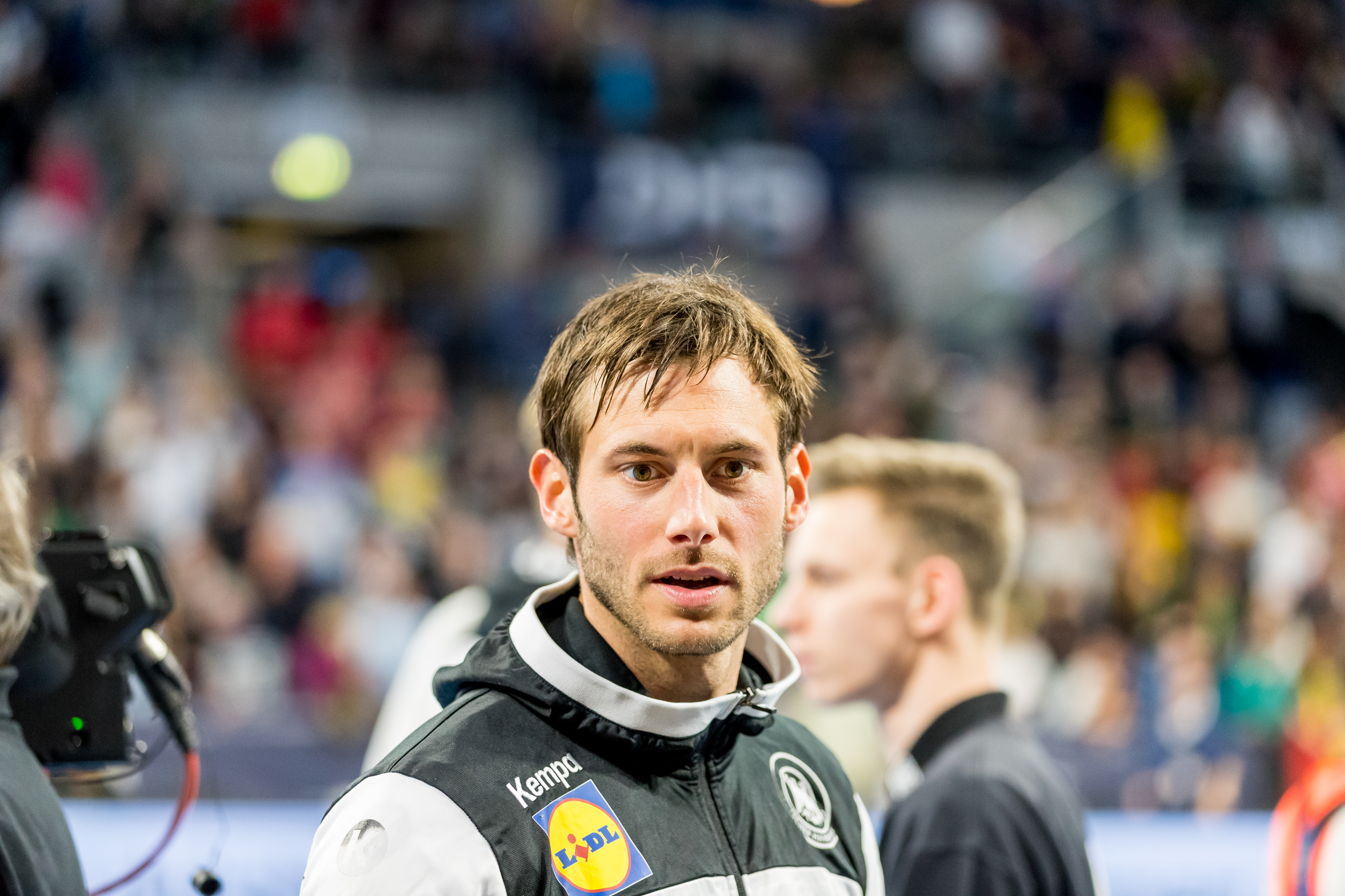 Uwe Gensheimer during Handball Deutschland vs Island 33 : 25 (16:13) at SAP Arena, Mannheim, Baden-Württemberg, Germany on 2020-01-04, Photo: Sven Mandel